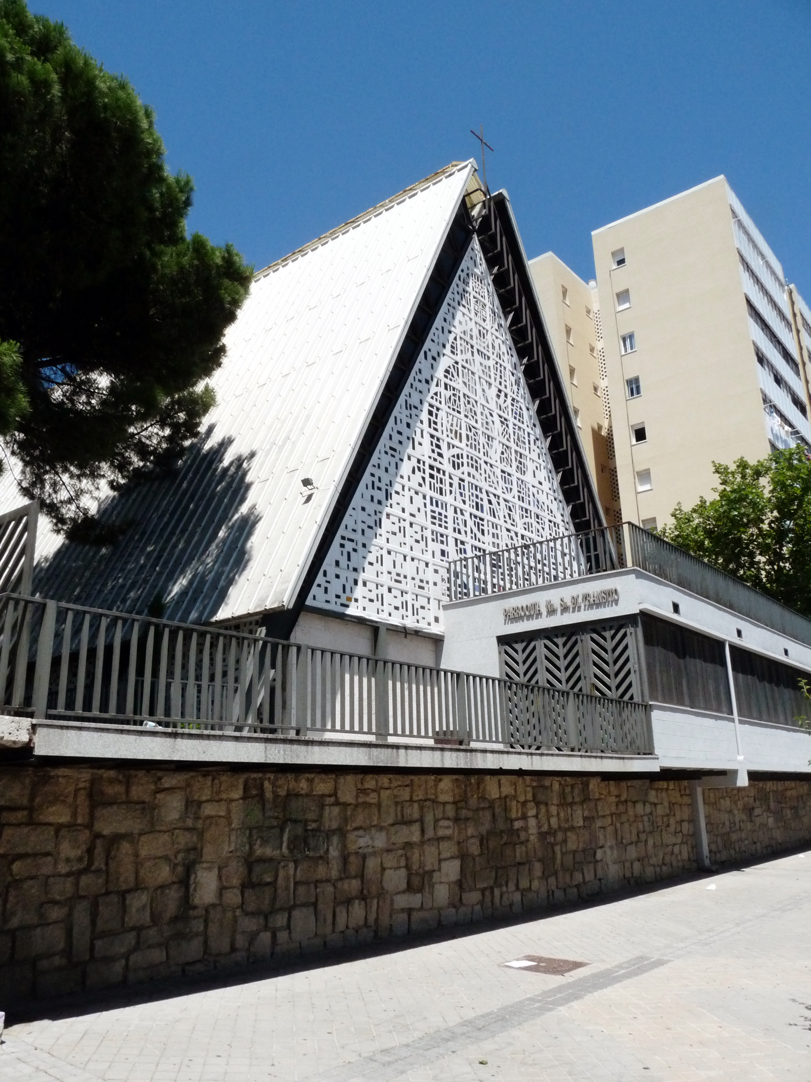 Parroquia de Nuestra Señora del Tránsito, fachada sur, Madrid, España.